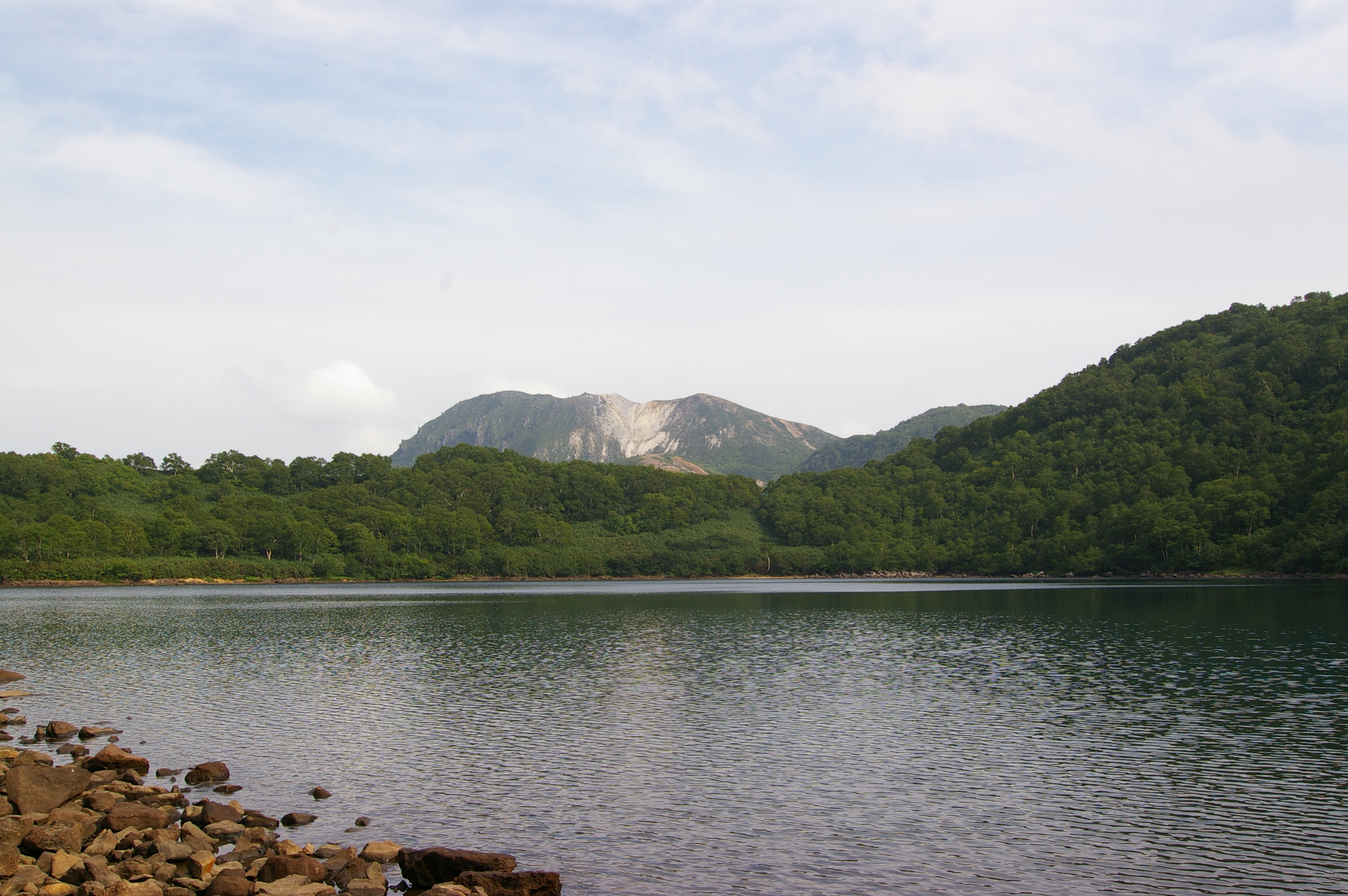 ニセコ大沼湖岸から望むイワオヌプリ